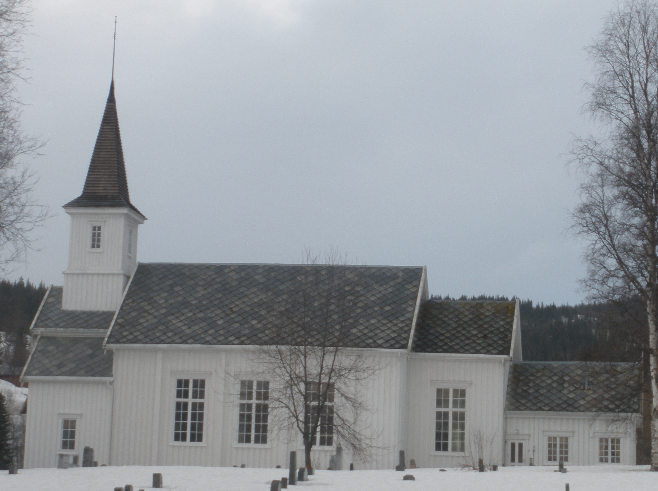 Bilde av Hattfjelldal Kirke